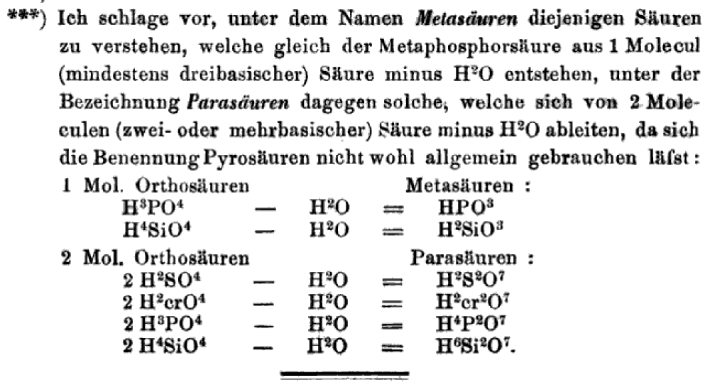 Orthosäuren